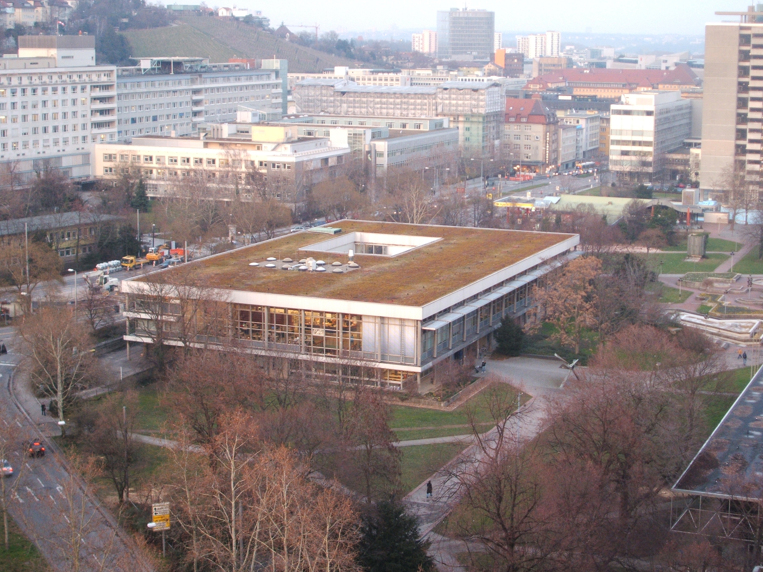 Universitätsbibliothek Stuttgart, Standort Stadtmitte, vom Max Kade Haus bei Sonnenuntergang. Rechts K2 Universität Stuttgart, links Hubschrauberlandeplatz Klinikum Stuttgart.